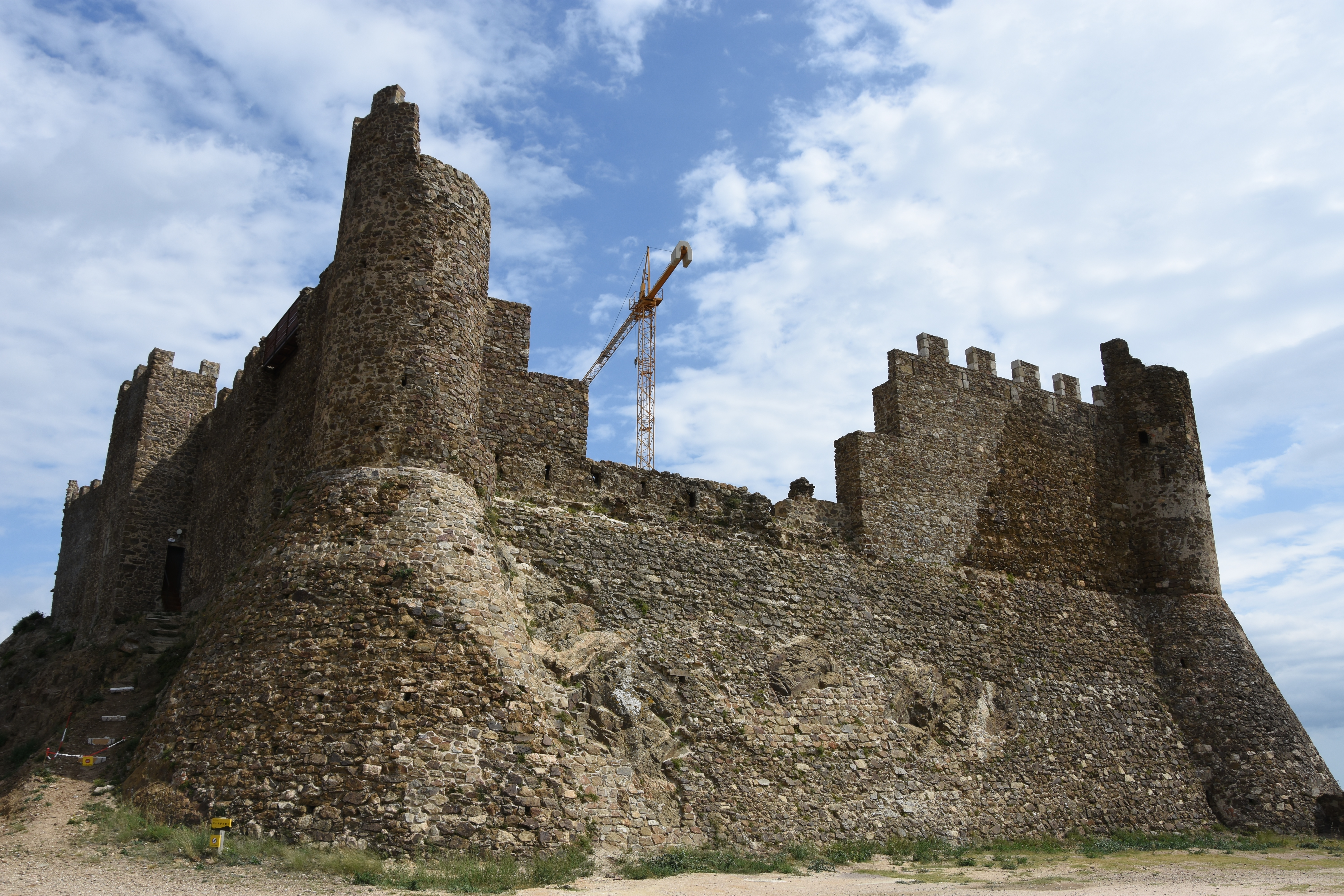 Torres i muralles des de l'exterior- Sector SO